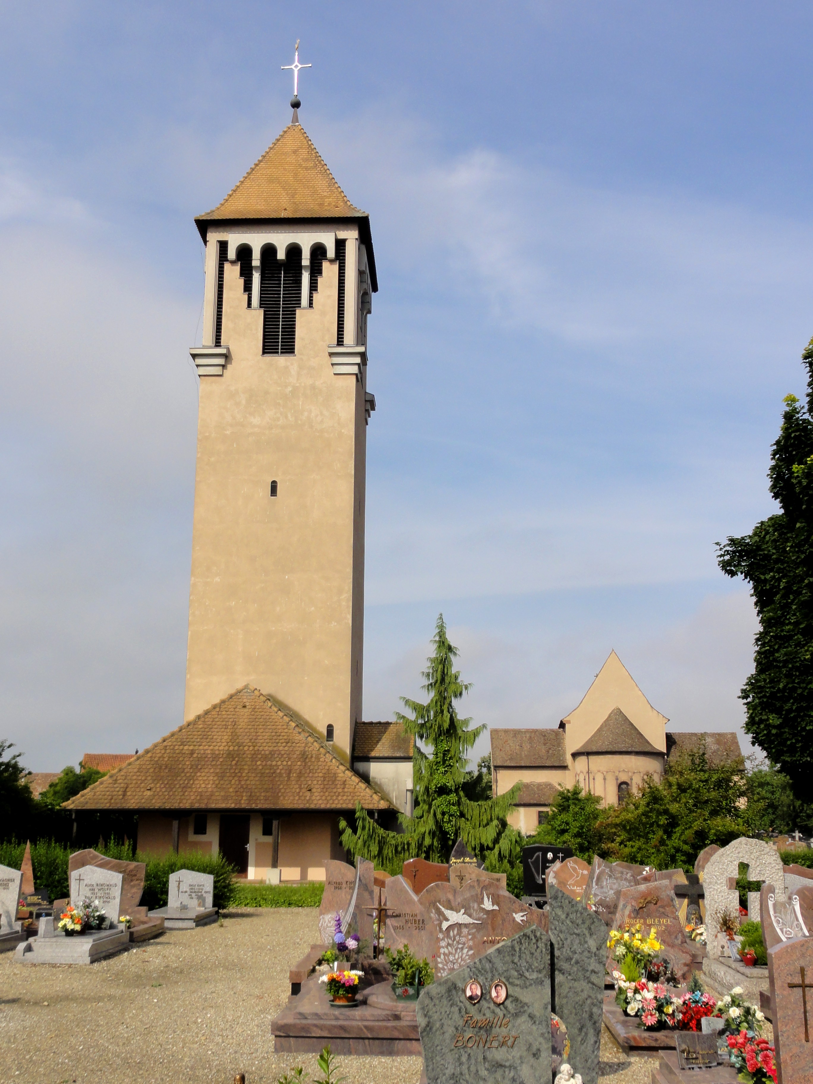 Alsace, Bas-Rhin, Église Saint-Trophime d'Eschau (PA00084707, IA00023089). Campanile construit au XXe.